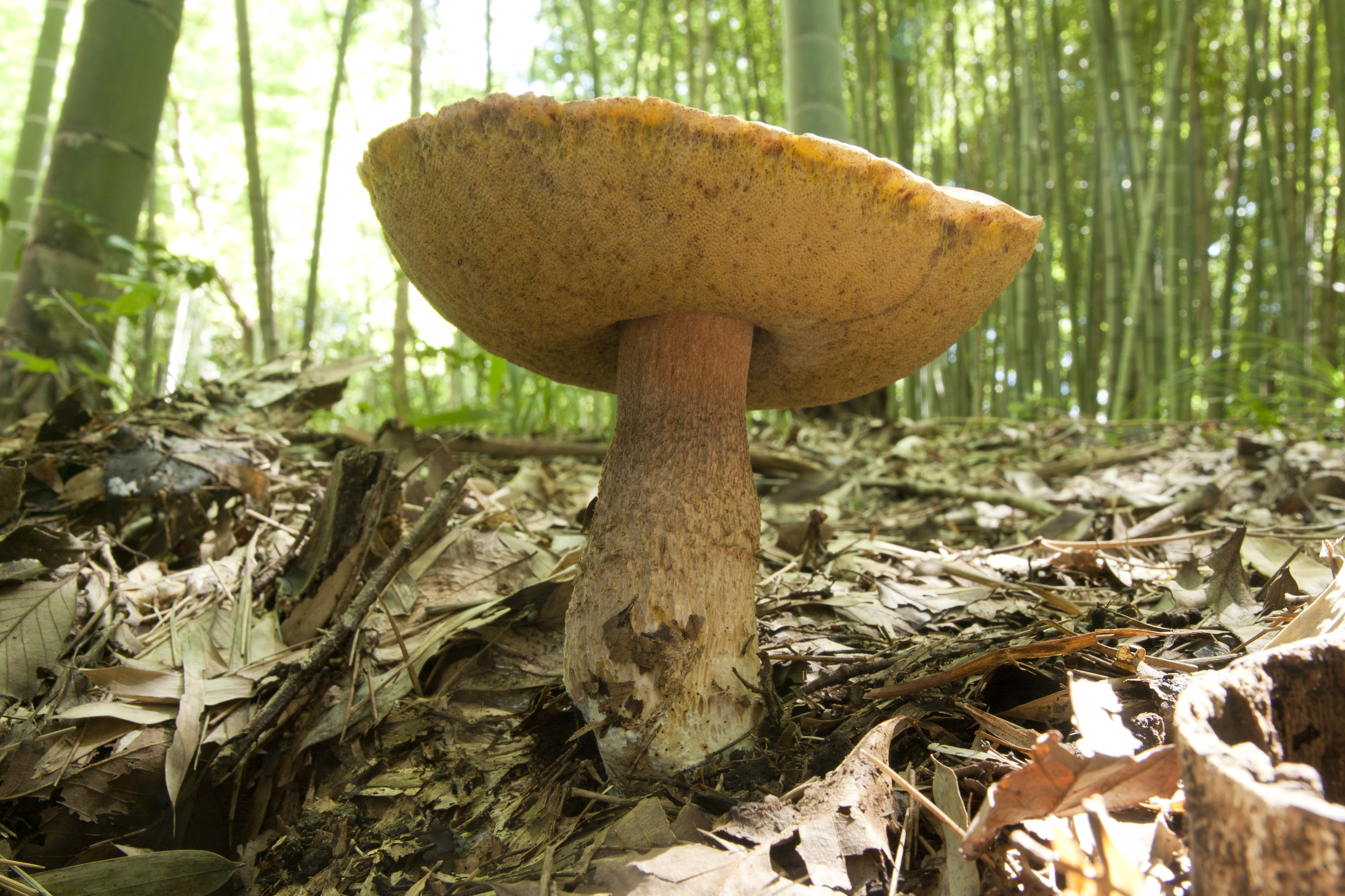 ヤマドリタケモドキ (学名:Boletus reticulatus)